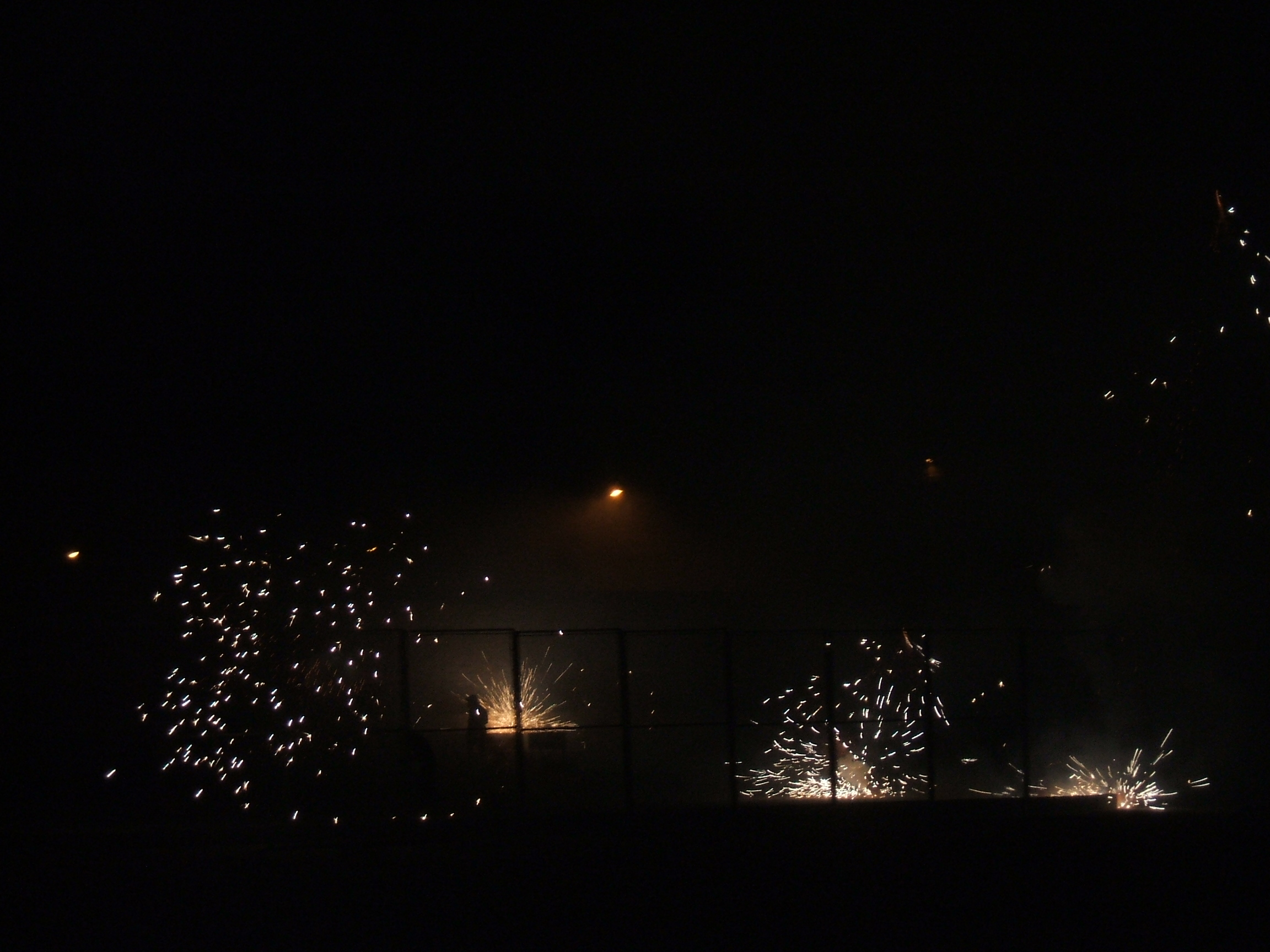 Esta foto es de la cordada de Puzol en la fecha indicada. En ella se utilizan cohetes carretilla para el espectaculo de pirotecnia